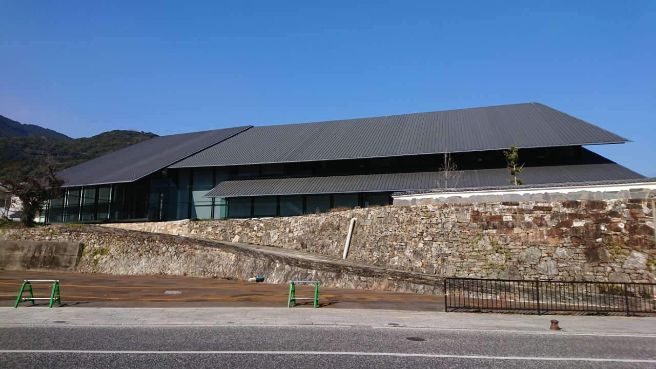 長崎県対馬市厳原町今屋敷に建設が進められている博物館。2020年度（令和2年度）中の開館を目指している。